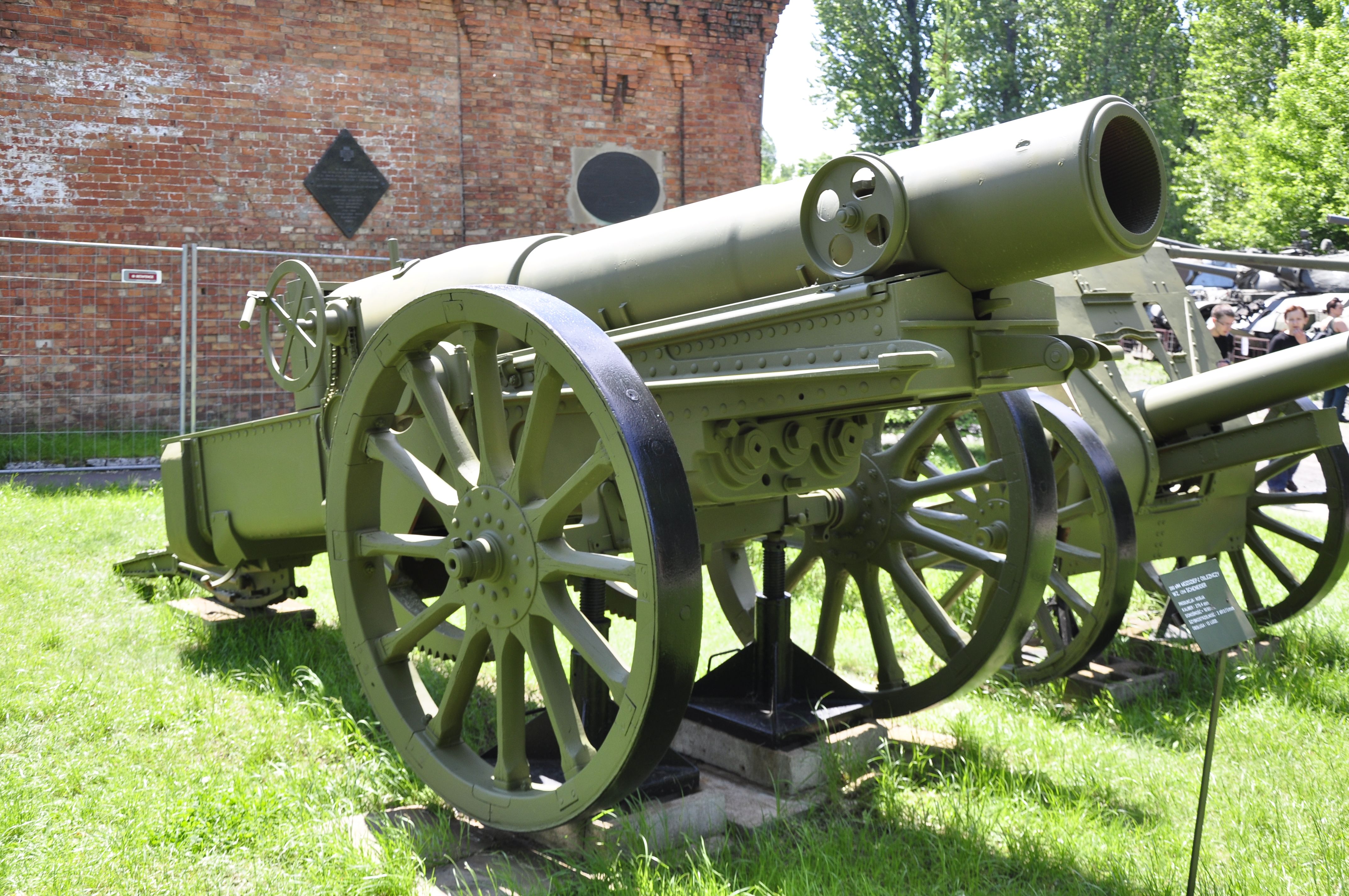 Fort IX Warschau, 280mm, 1914 Scheneider, Russland, Kal 279,4mm, Reichweite 10.950m, 2 Schuss/5 Minuten, Personal 12 Mann